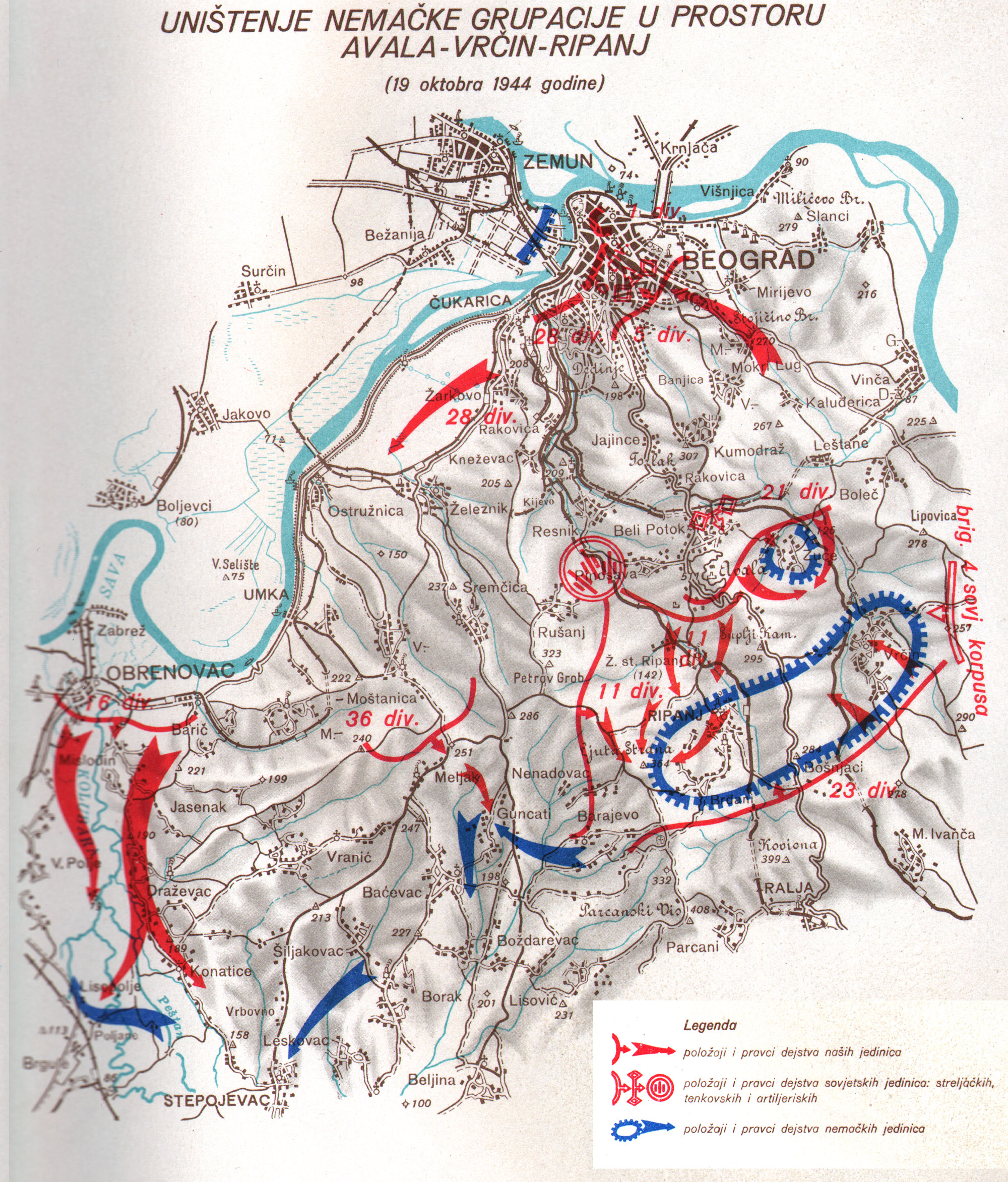 Srpskohrvatski / српскохрватски: Uništenje nemačke grupacije u prostoru Avala - Vrčin-Ripanj (19 oktobra 1944 godine)